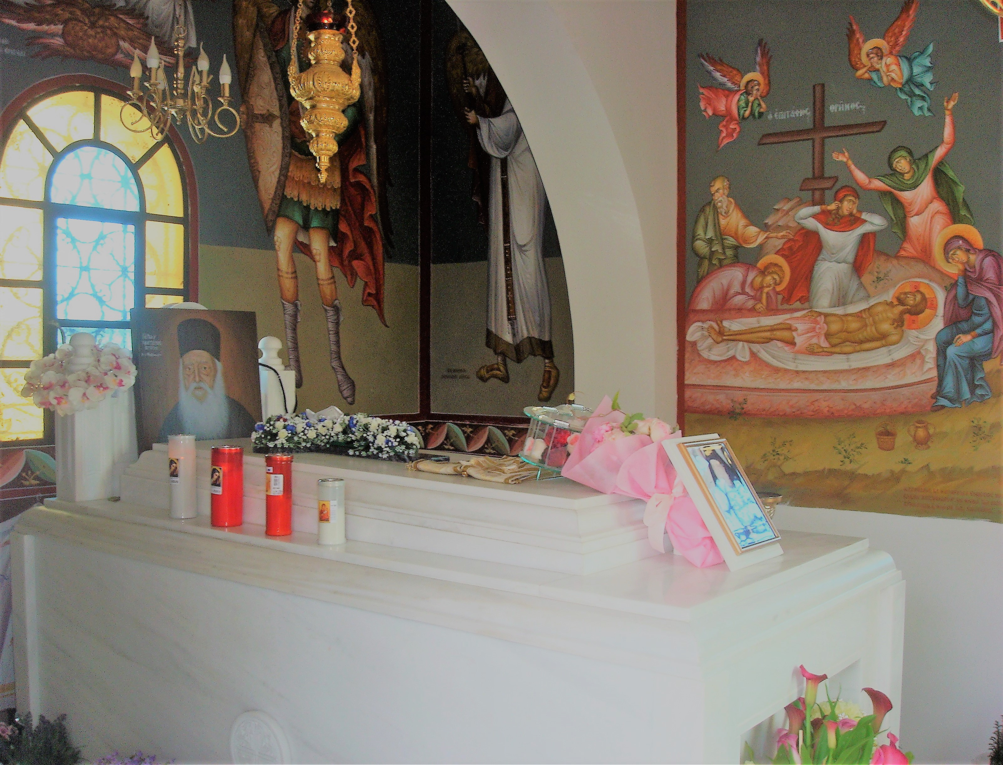 Στη βάση του κωδωνοστασίου του Ι. Ναού Αγ. Νεκταρίου στην Καμάριζα του Λαυρίου.